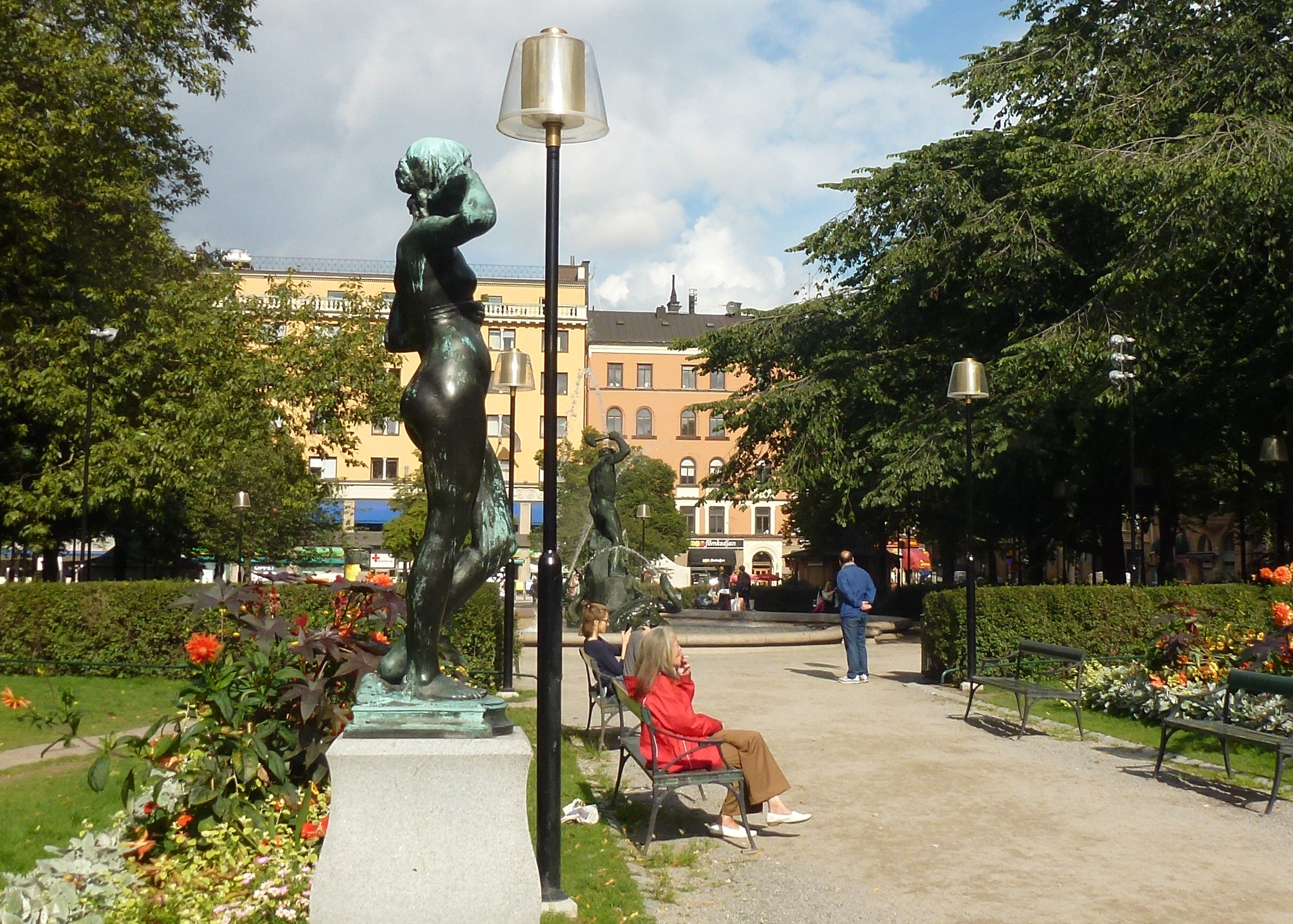 Mariatorget mes skulpturen "Snöklockan"